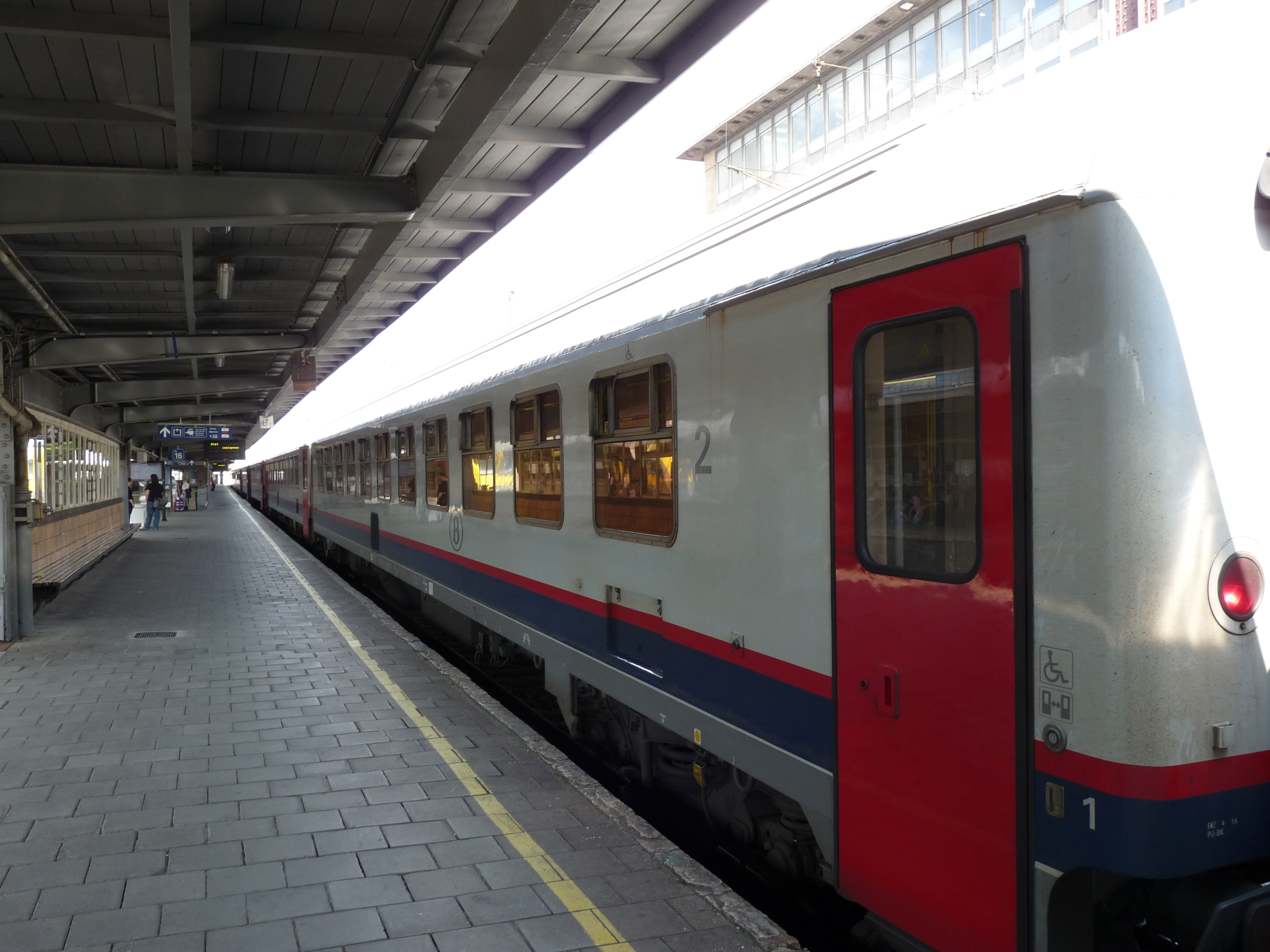 Beneluxtrein in Brussel Zuid met acht I10 en I6 rijtuigen. Hier zijn alleen I6 rijtuigen te zien.